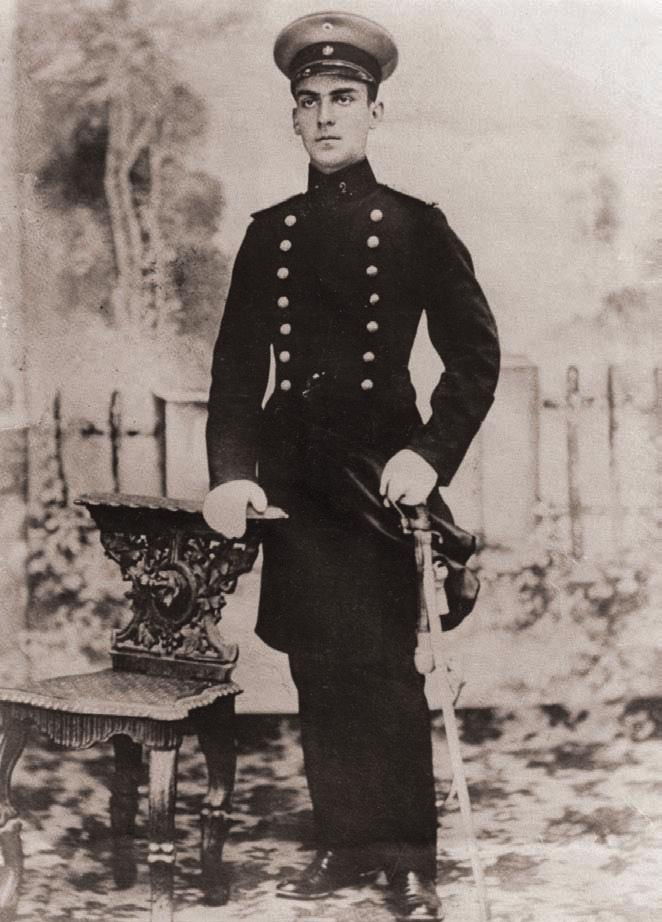 El piloto militar, teniente 2º Francisco Mery retratado en una de sus últimas fotografías.